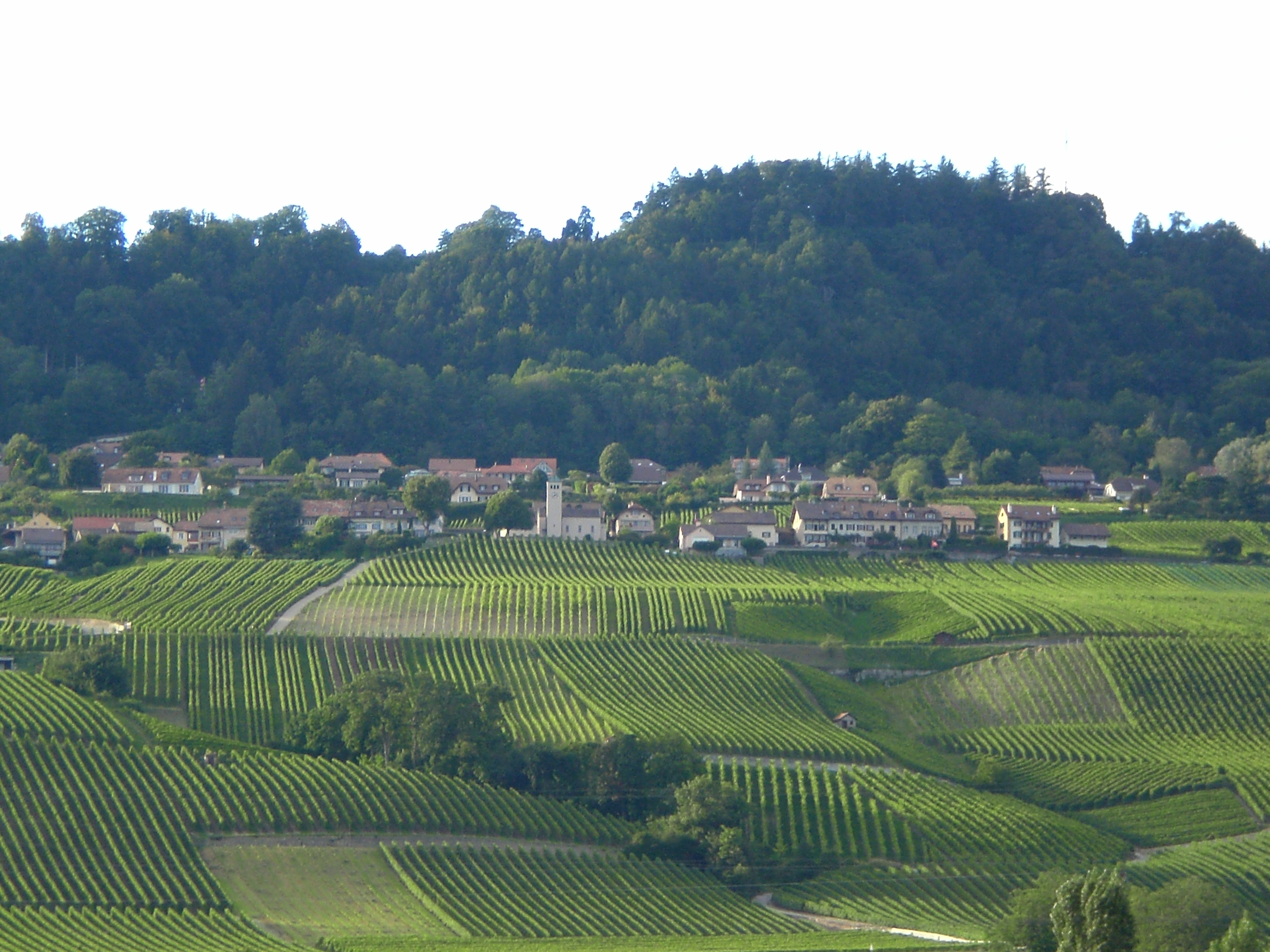 Vue panoramique sur la commune de Bougy-Villars depuis Perroy